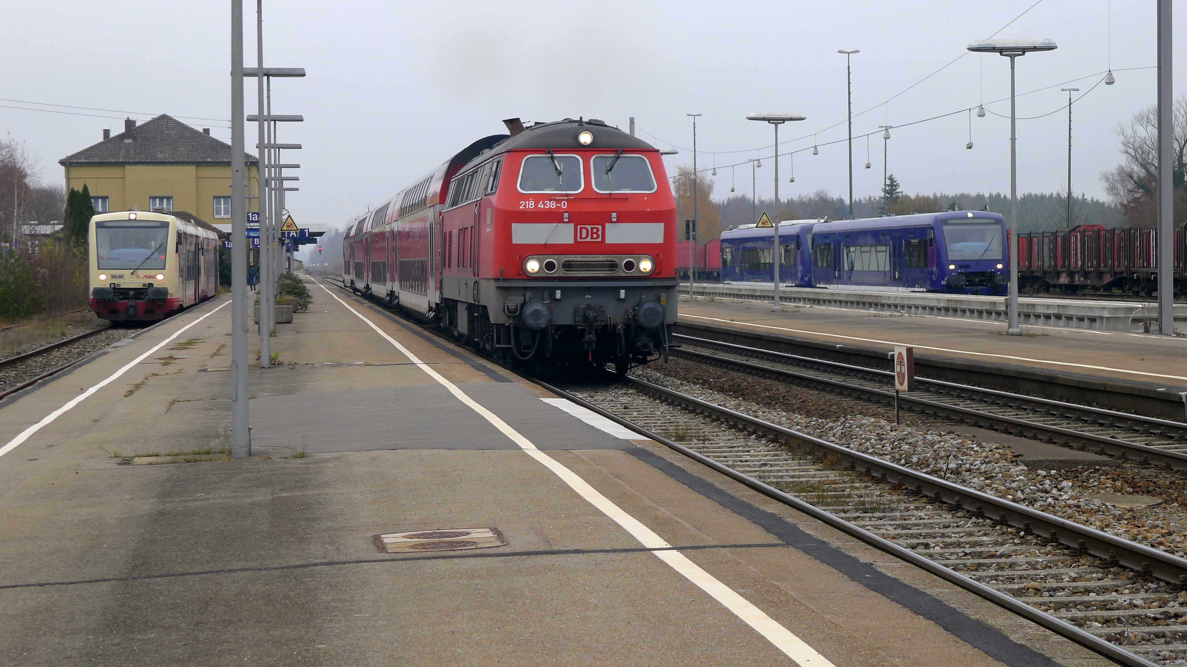 Bahnhof Aulendorf im November 2011 mit Zügen von drei verschiedenen Gesellschaft: DB, HZL und BODO